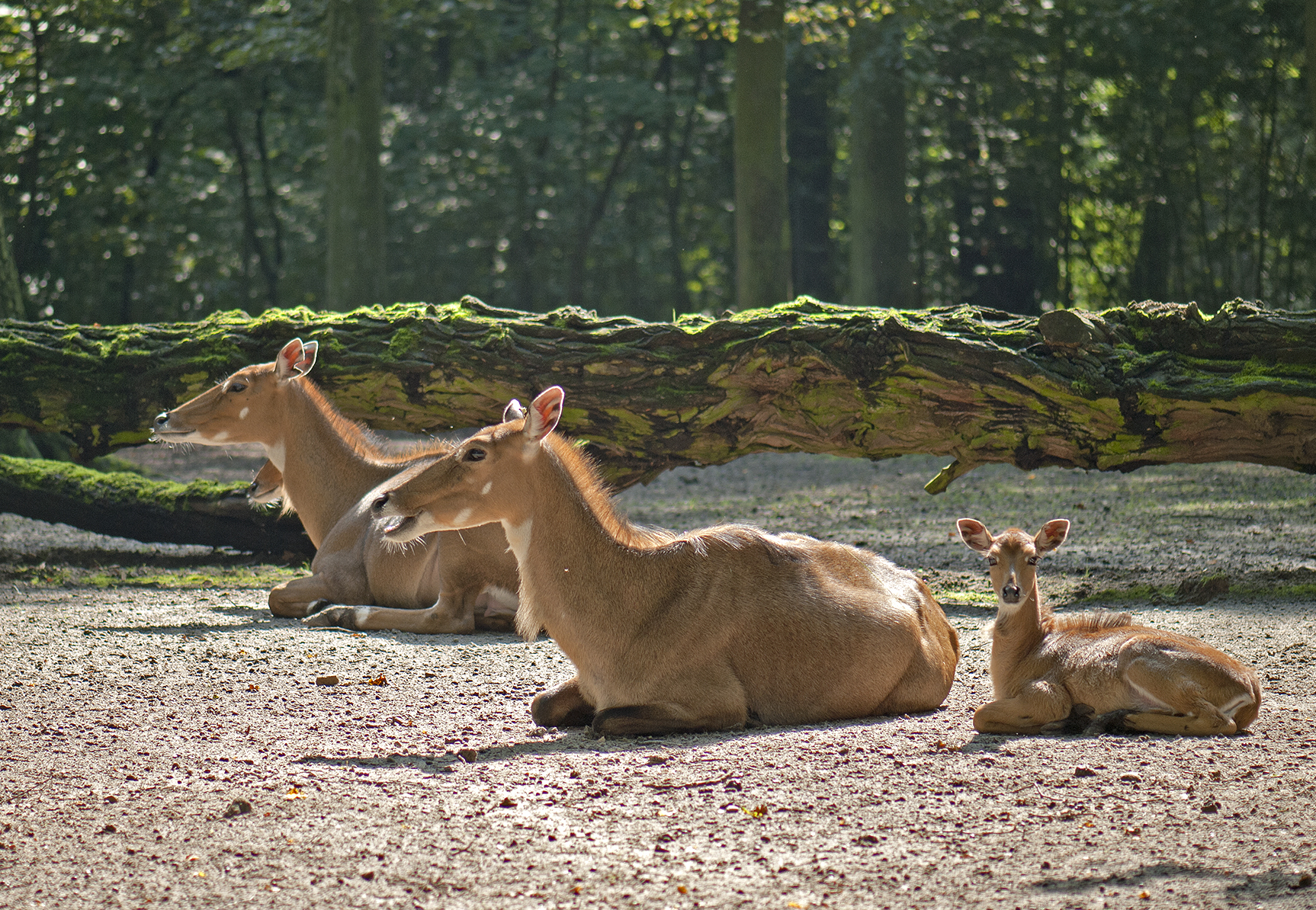 Nilgau odpoczywające